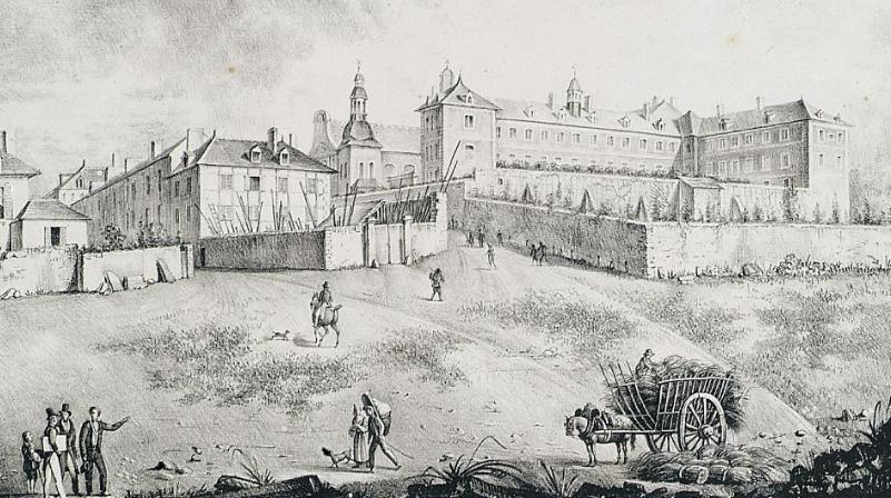 Le collège du Mans, actuel lycée Montesquieu au début du XIXème siècle.